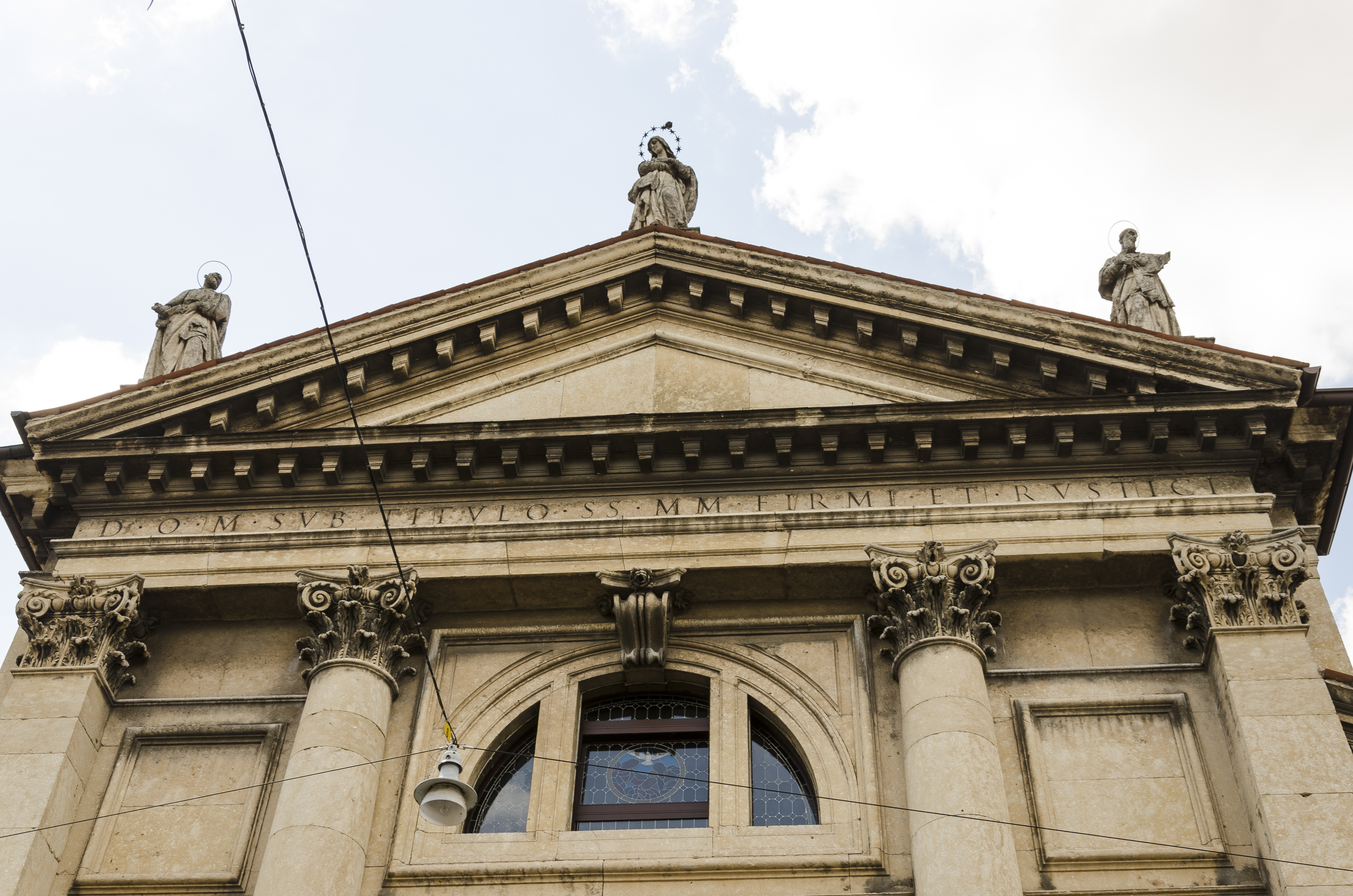 Chiesa dei Filippini, esterno, Verona